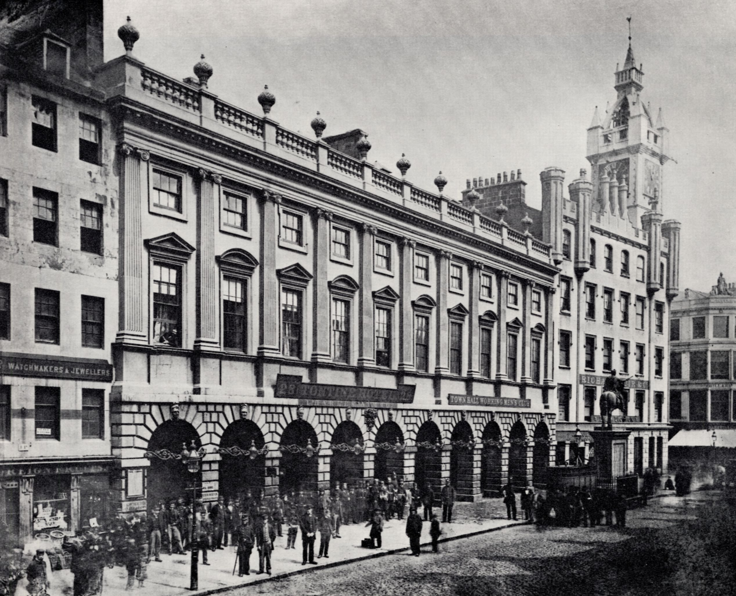 Annan, Thomas: Tontine Gebäude, Trongate